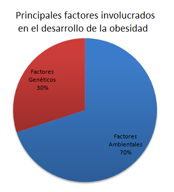 Porcentaje de los principales factores de la obesidad según Mazza (2001)